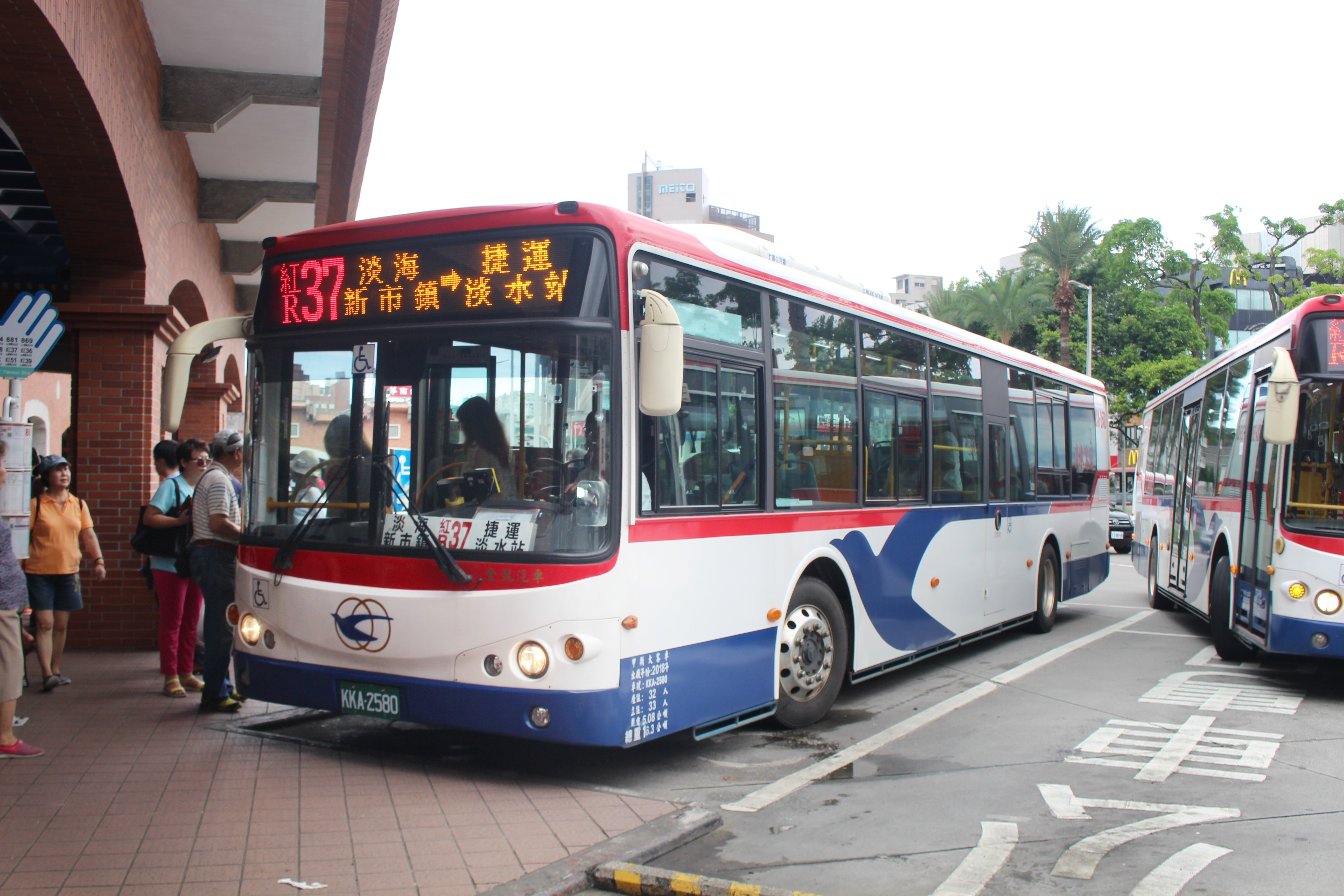 淡水客運KKA-2580 紅37 KL6120U1